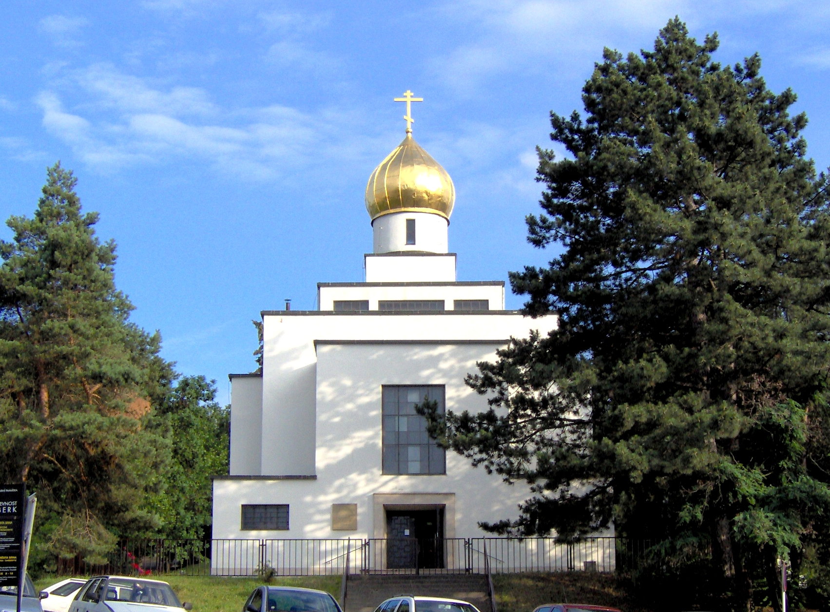 Pravoslavný kostel svatého Václava Brno, Gorazdova ul.